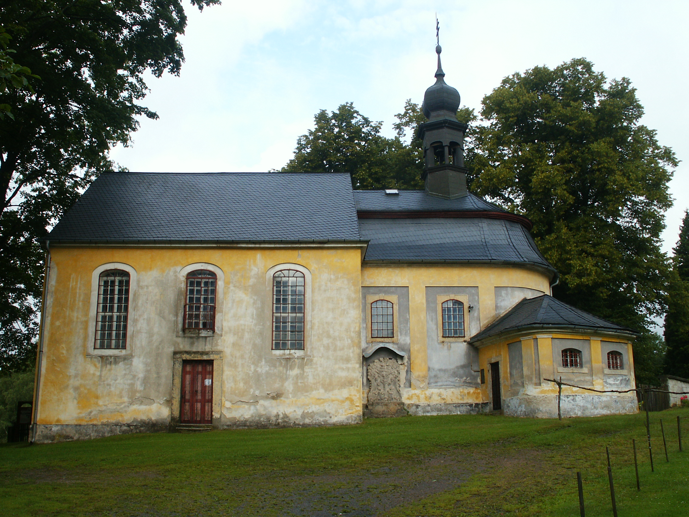 Kostel Panny Marie Sněžné, Sněžná (Krásná Lípa) - pohled of jihovýchodu.